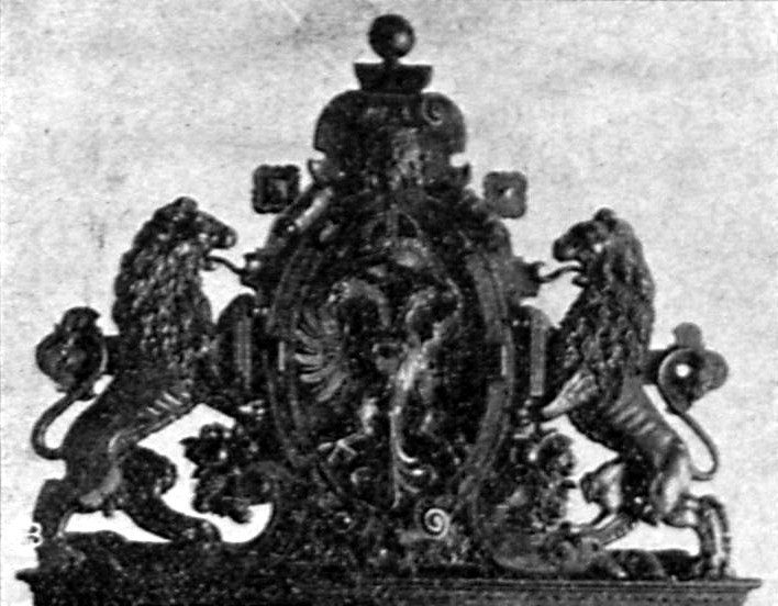 Altes Lübeckisches Stadtwappenoberhalb des Kriegsstuben Einganges im Rathaus, Holzschnittarbeit, hergestellt 1595-1608 durch Tönnies Evers.